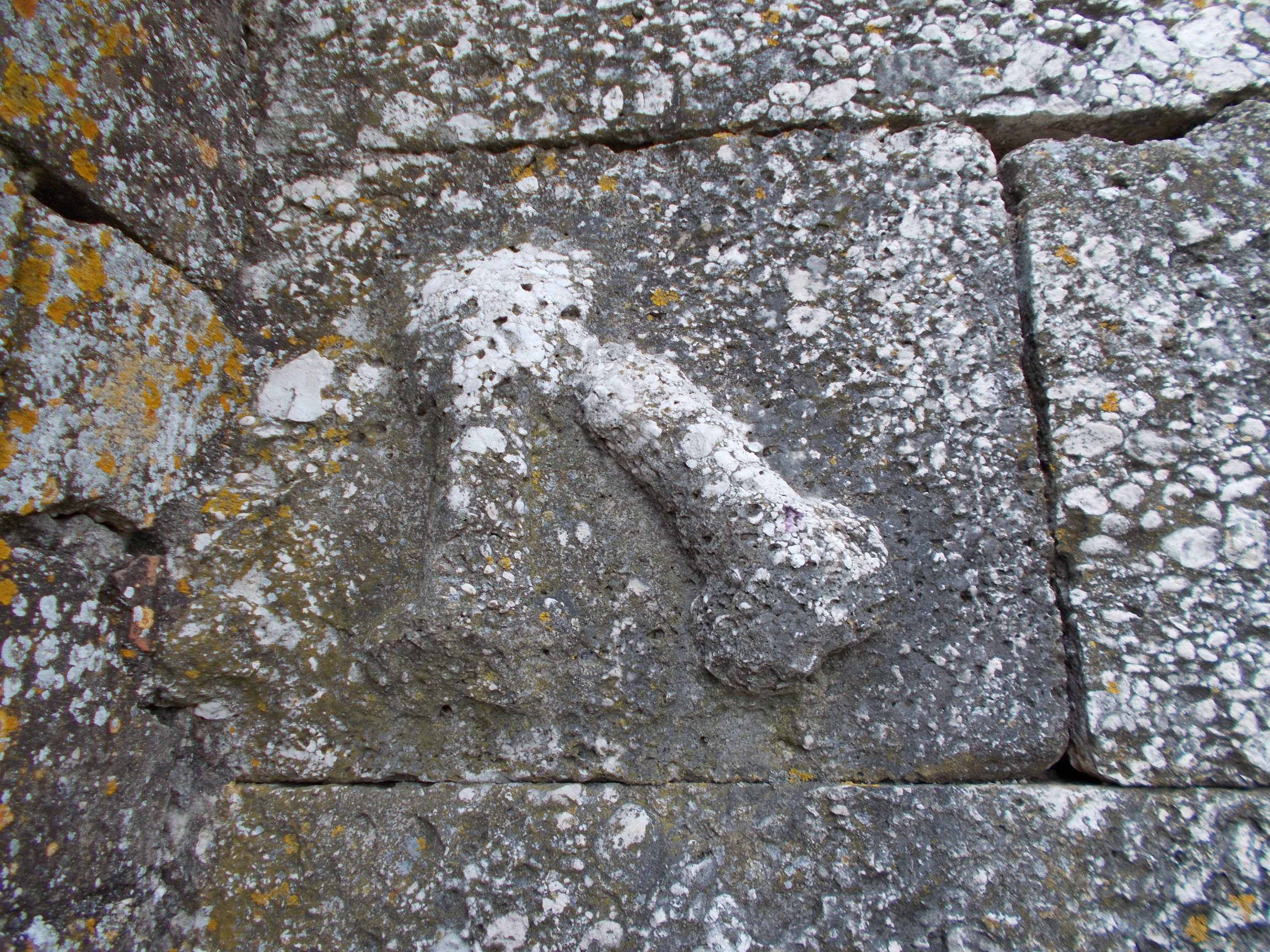 Simboli fallici scolpiti in altorilievo sull'angolo nord delle mura.